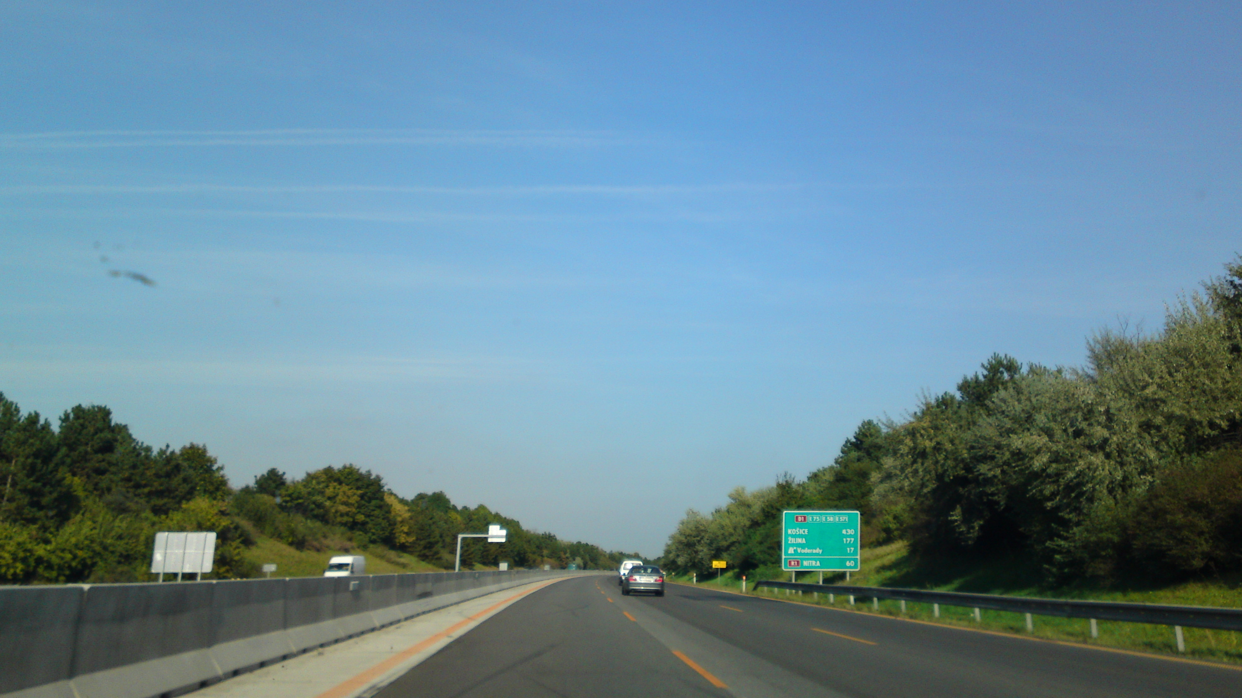 Die slowakische Autobahn D1 kurz hinter Anschlussstelle Senec. Man beachte den neuen „Standard“ für slowakische Autobahnschilder sowie die Benutzung temporärer (orange) Markierung für die erweiterte Autobahn ohne Standspur. Keine Baustelle dort. Aufnahme während der Fahrt.